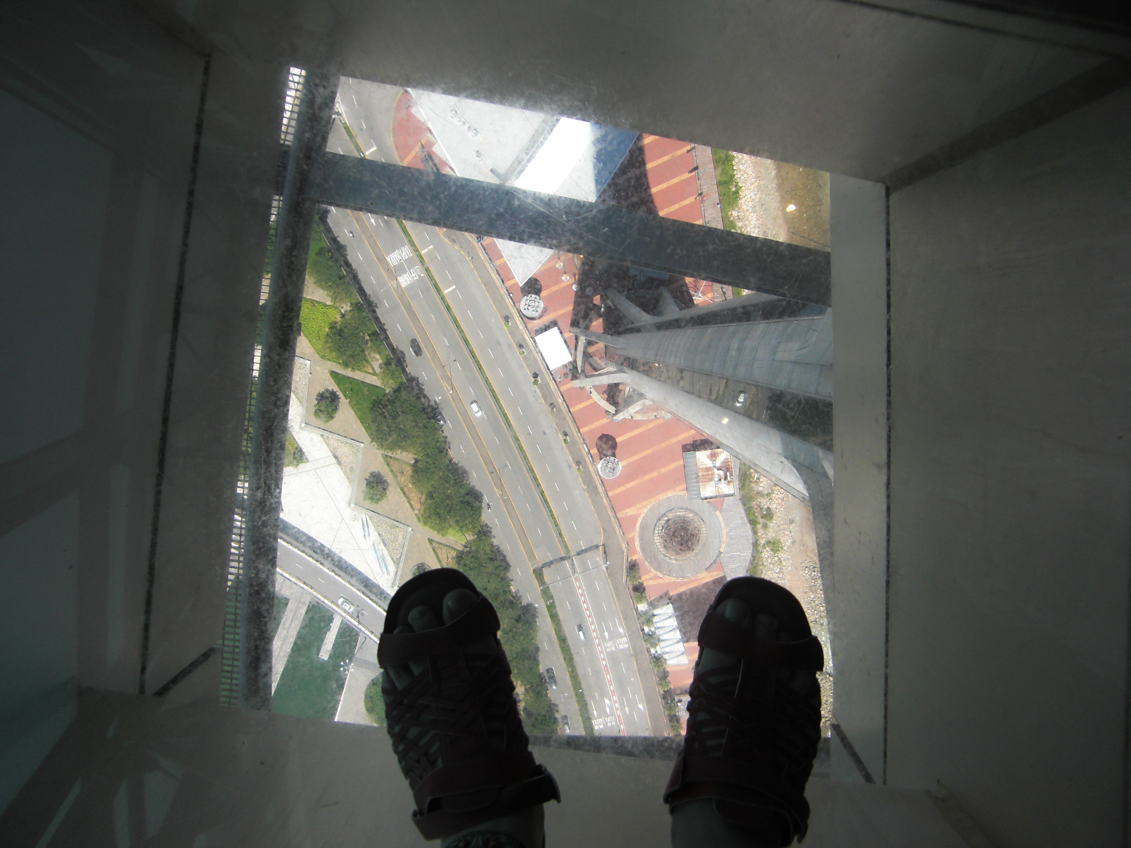 58階展望台にあるガラス張りの床。